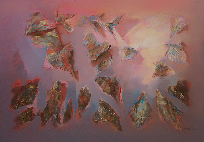 Jánosi Katalin (1951. november 2. -) magyar festő- és gobelinművész alkotása: Rebbenés, 2003, olajfestmény, 70x100 cm